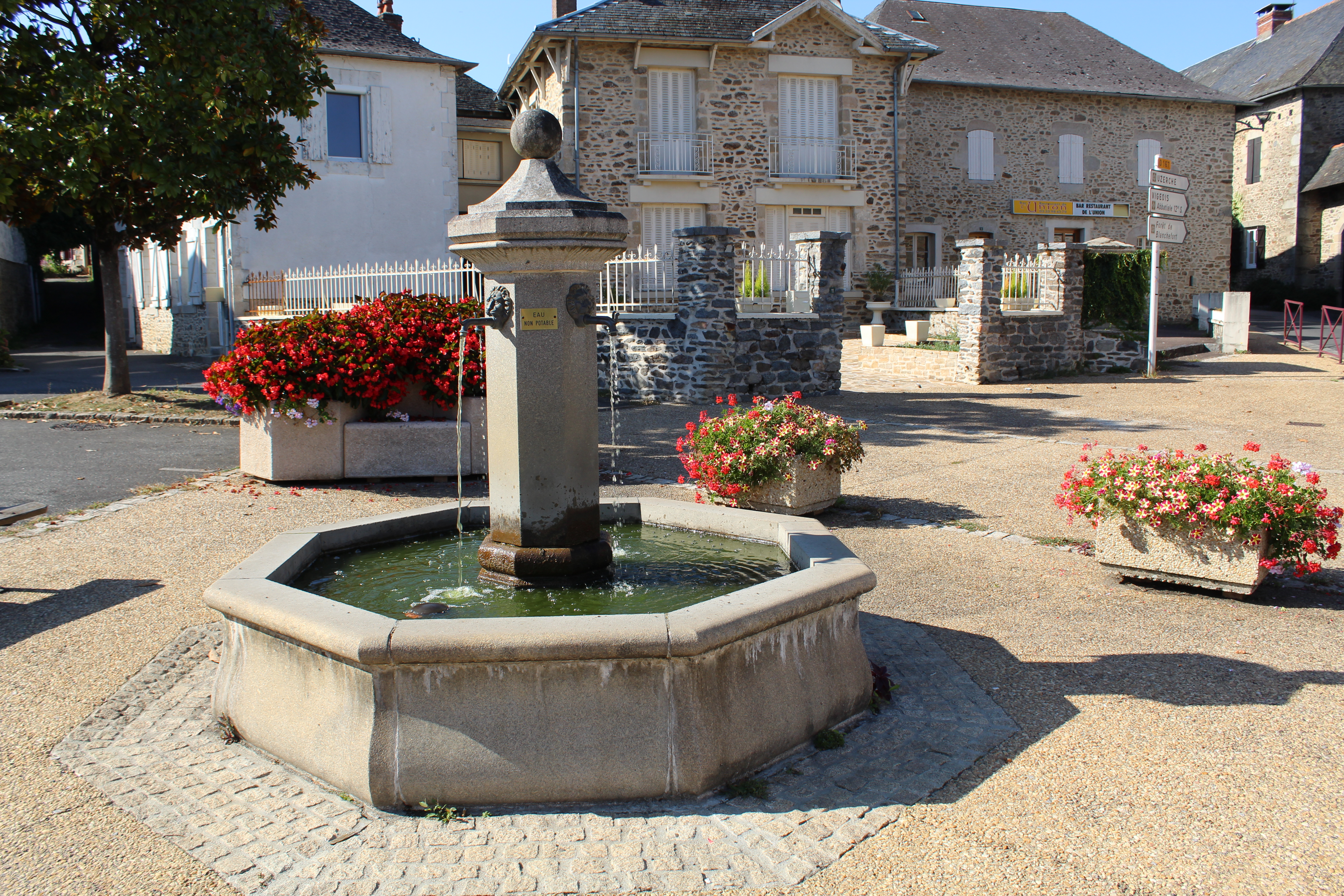 La fontaine.